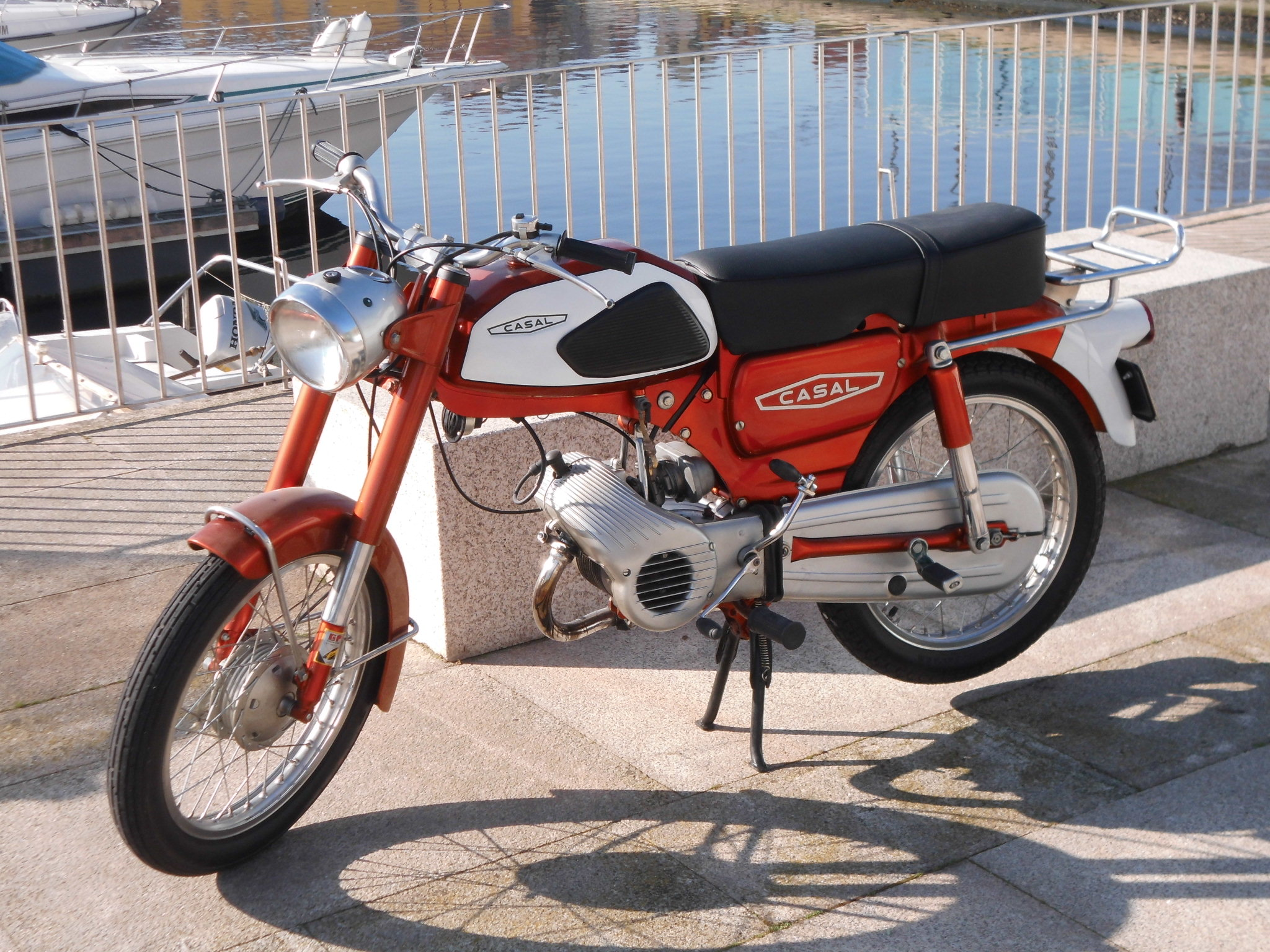 Casal K181 a Vila do Conde